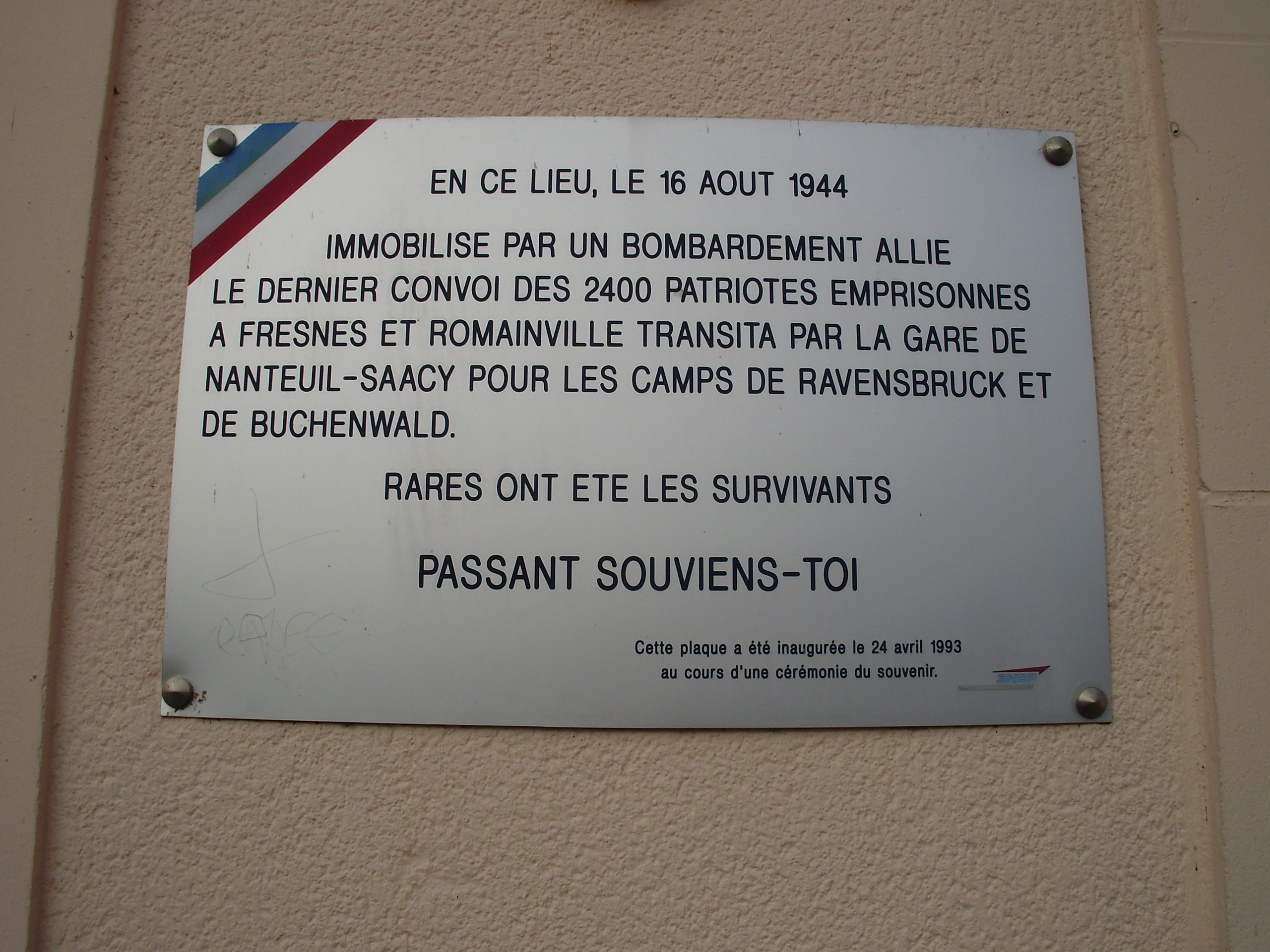 Gare de Nanteuil - Saâcy, à Saâcy-sur-Marne, Seine-et-Marne, France : Plaque commémorative apposée sur la façade de la gare